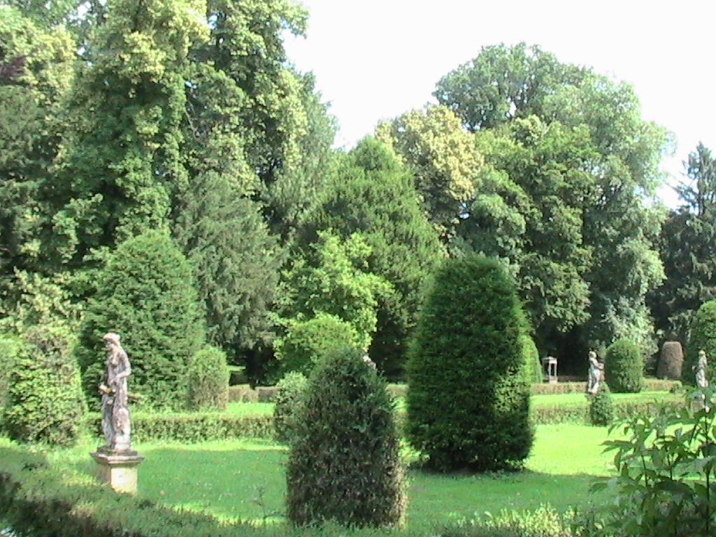 Torre de' Picenardi - Il Villino - giardino